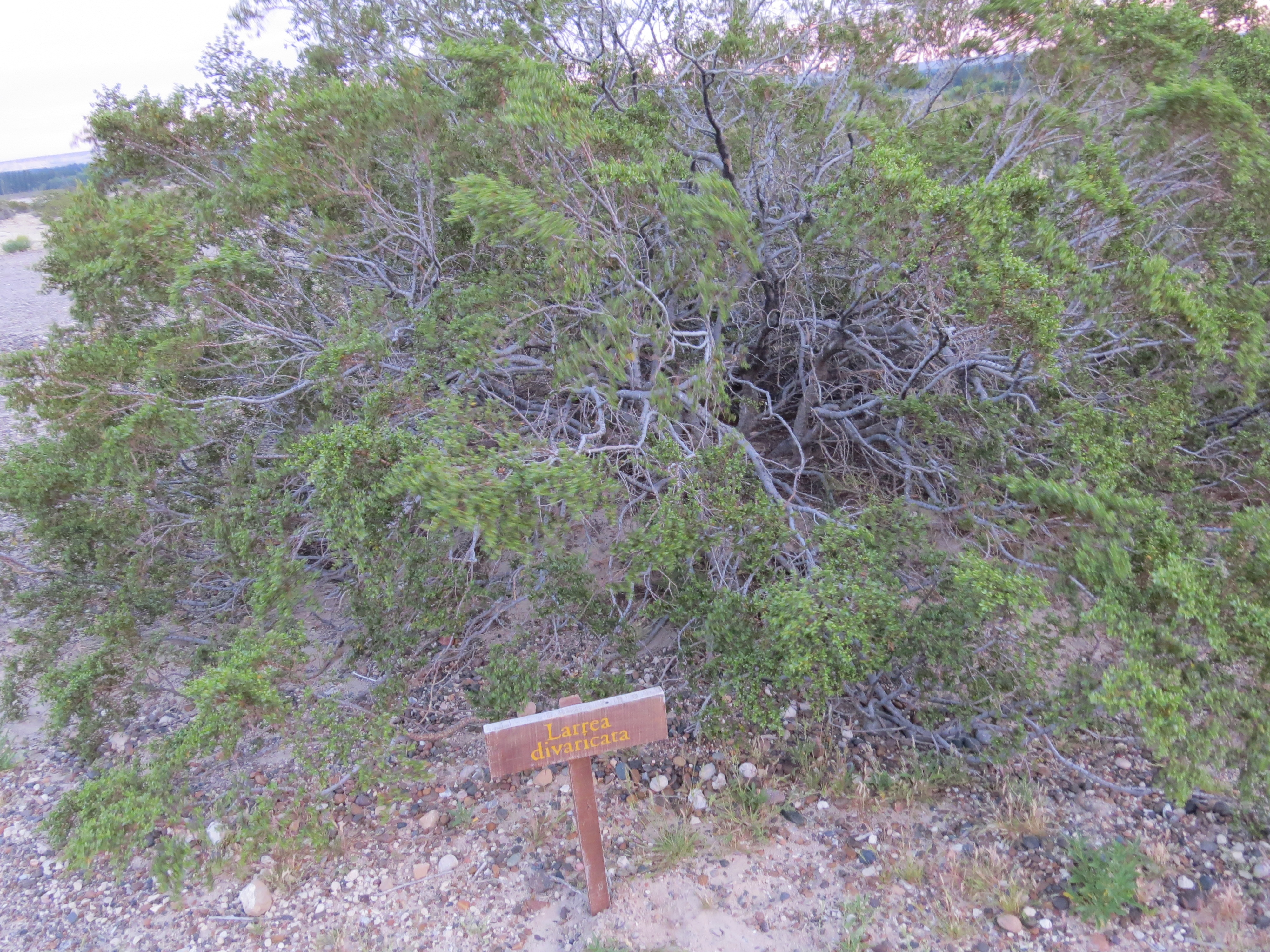 Flora de Bryn Gwyn